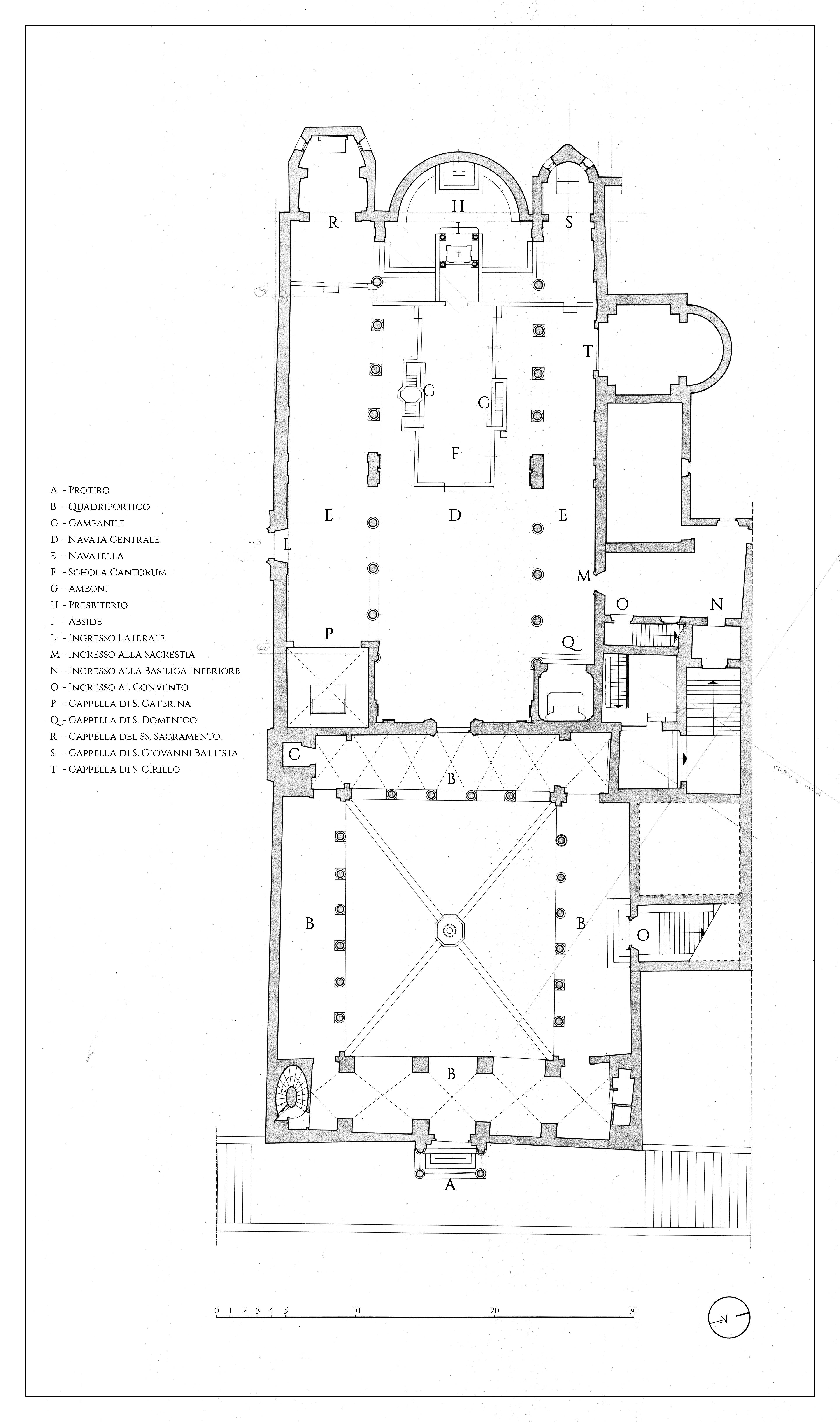 Pianta attuale (2014) della Basilica superiore di San Clemente, Roma